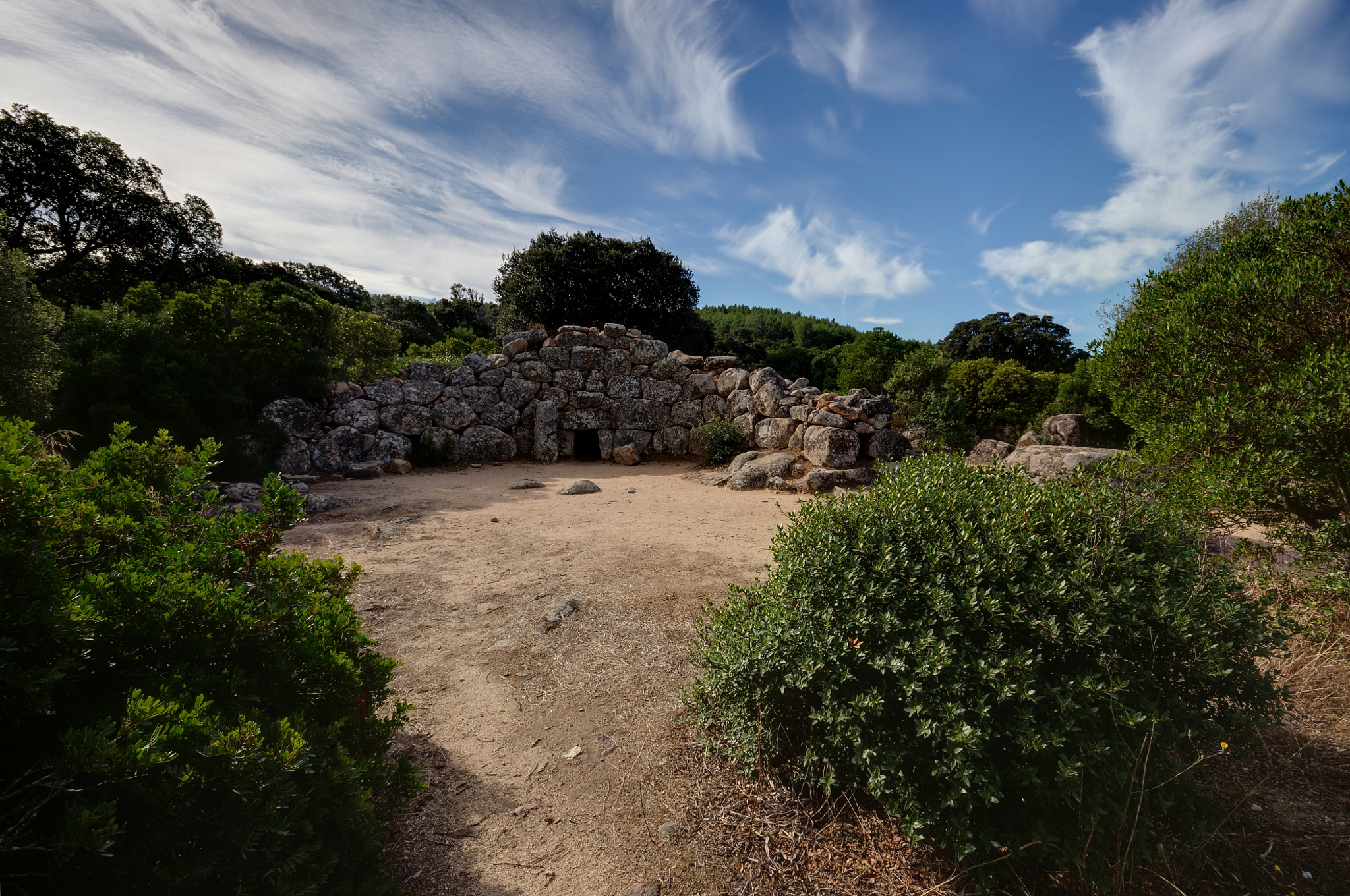 La tomba dei Giganti Is Concias si erge sui versanti occidentali del massiccio dei Sette Fratelli, nel terrritorio del comune di Quartucciu, in Sardegna. Il monumento è databile all'Età del Bronzo Medio – Bronzo Recente.